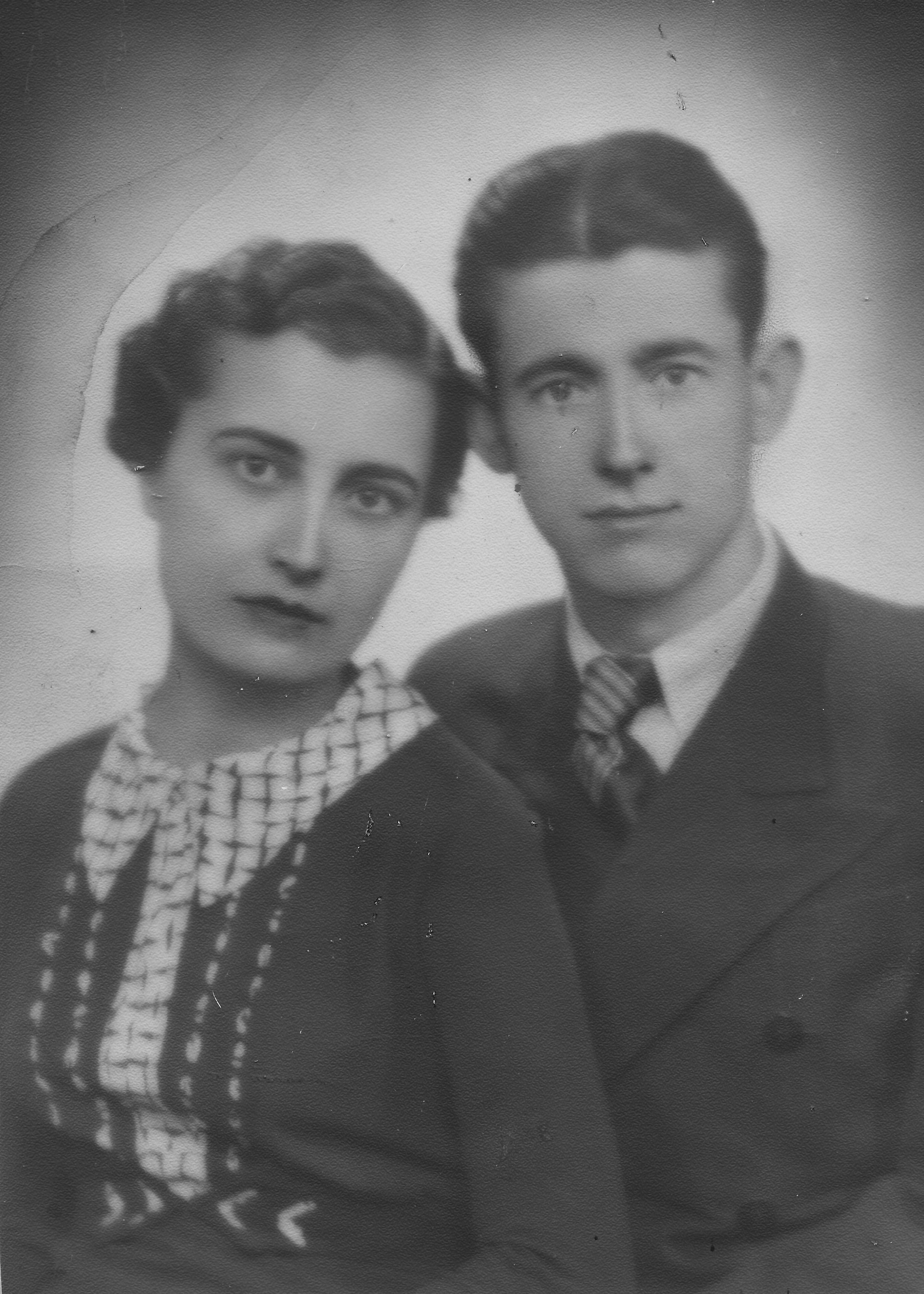 Αγγελική και Χάρης Πάτσης, 1939